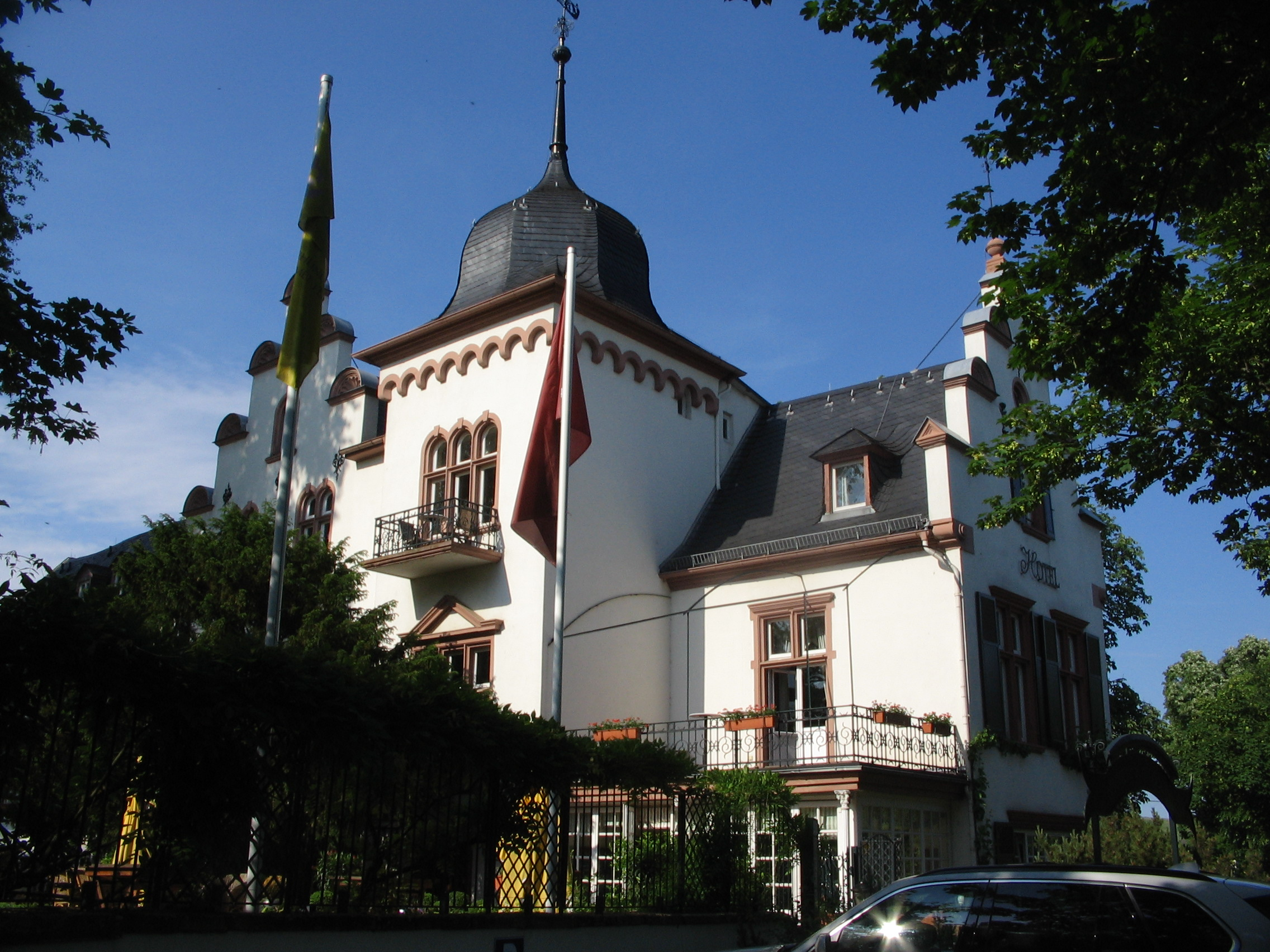 Hotel Kronenschlösschen in Hattenheim This is a photograph of an architectural monument.